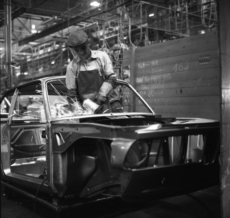 Autowerk BMW-München Halle 33 Rohbau Straße für 1600er Modell. Nach dem Zusammenschweissen der Karosserie aus Einzelteilen mit Spezialvorrichtungen bzw., mit Spezialmaschinen wird die Karosserie an den Stellen der Außenhaut überschliffen, an denen die Schweisspunkte sichtbar sind oder stören.